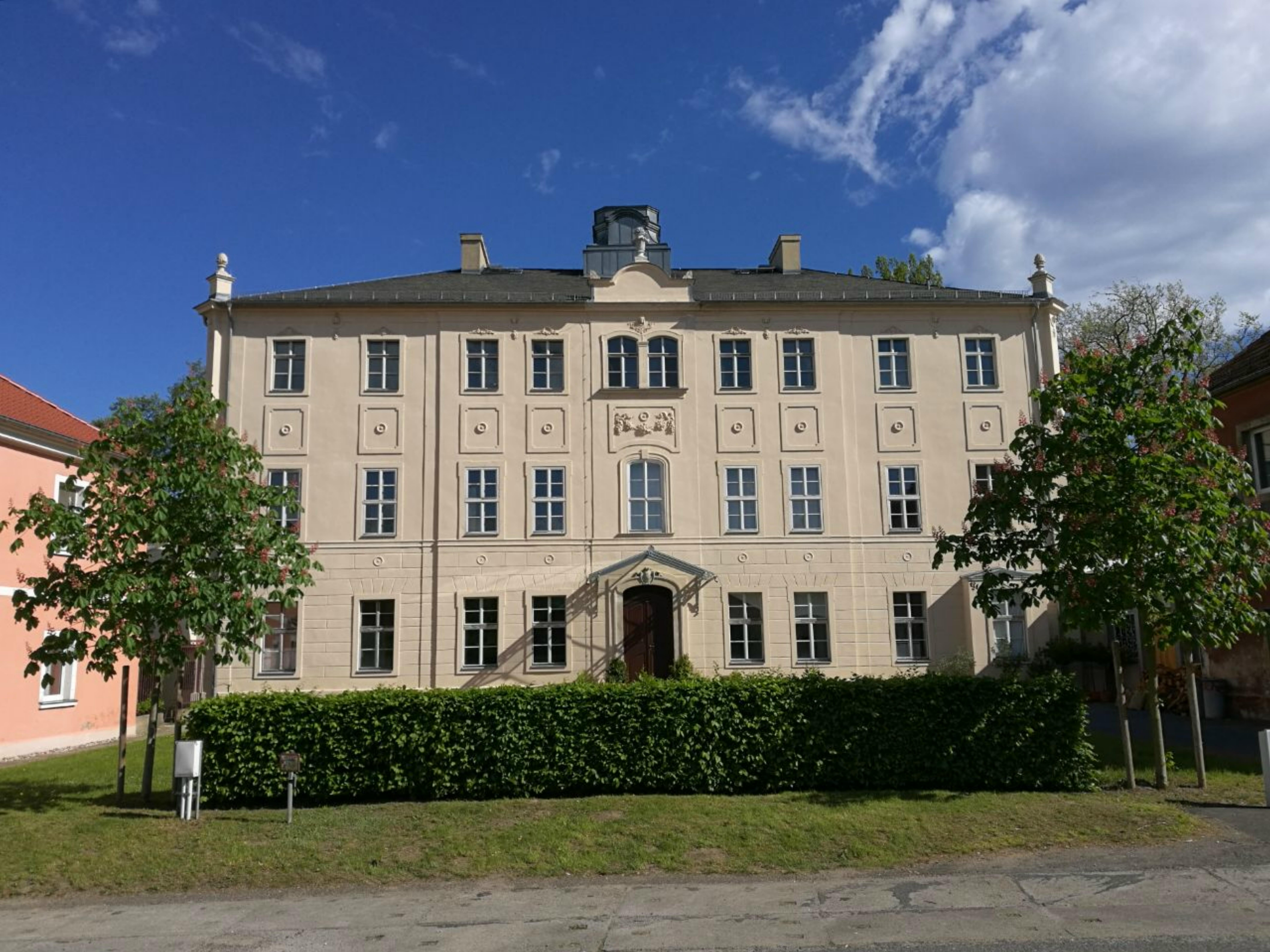 Schloss Lauterbach bei Ebersbach im Landkreis Meißen, mit restaurierten Krönungsvasen April 2018